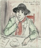 Tableau Marie à l’atelier, de Léon Weissberg